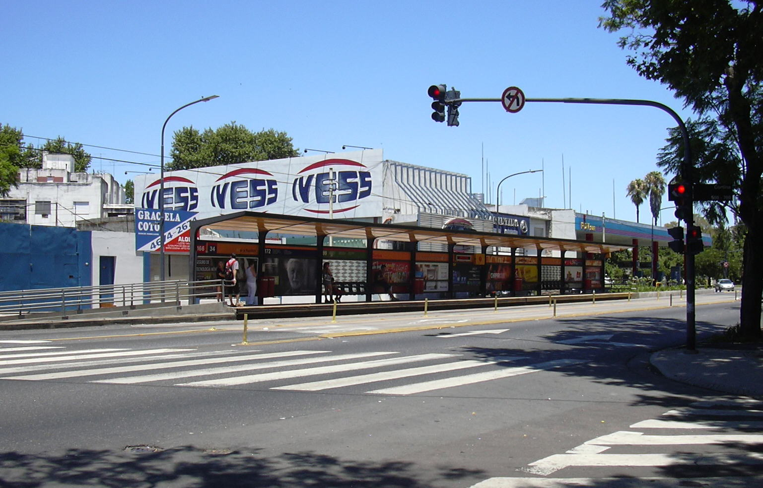 El andén sur de la estación Cortina del Metrobús de Buenos Aires, visto desde el noreste